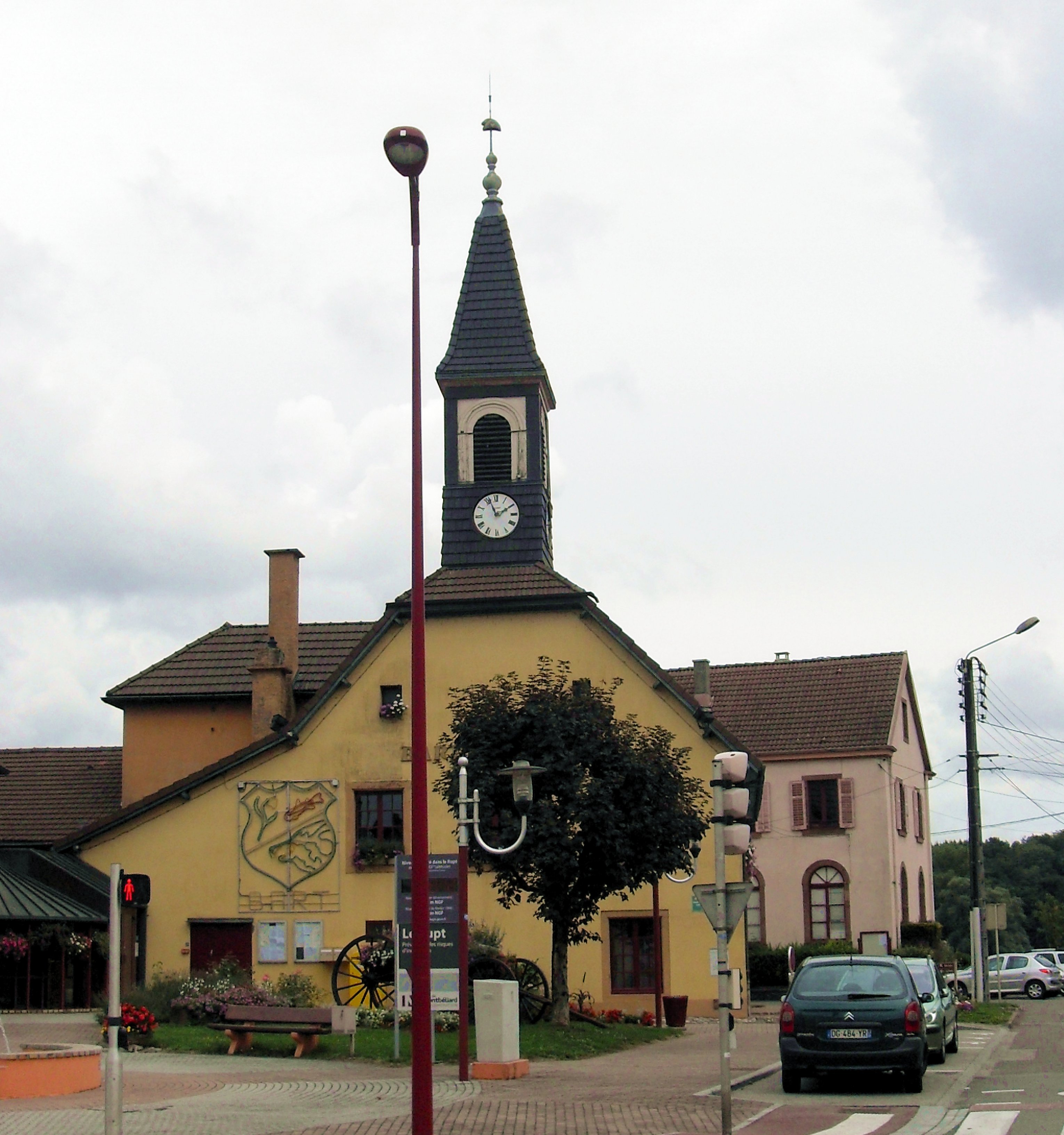 la tour de l'horloge de Bart, maintenant un bureau de poste